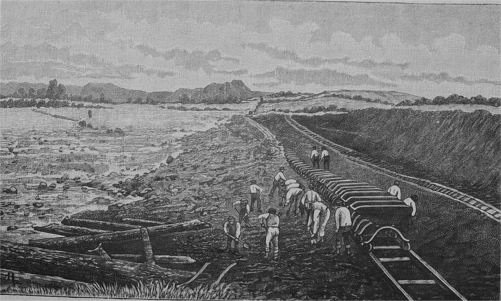 Bau des Nordostseekanals